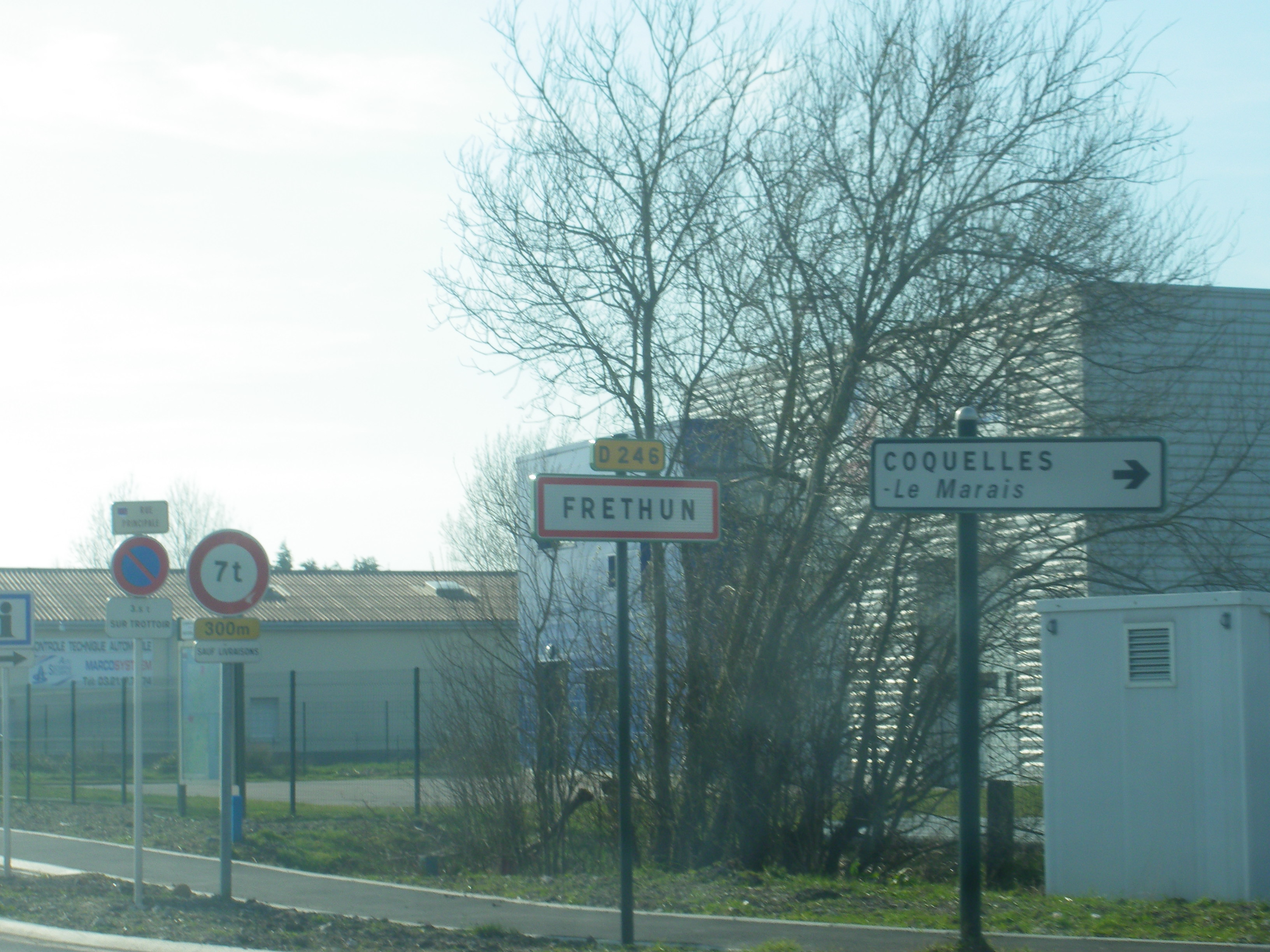 Panneau d'entrée de la commune de Fréthun.